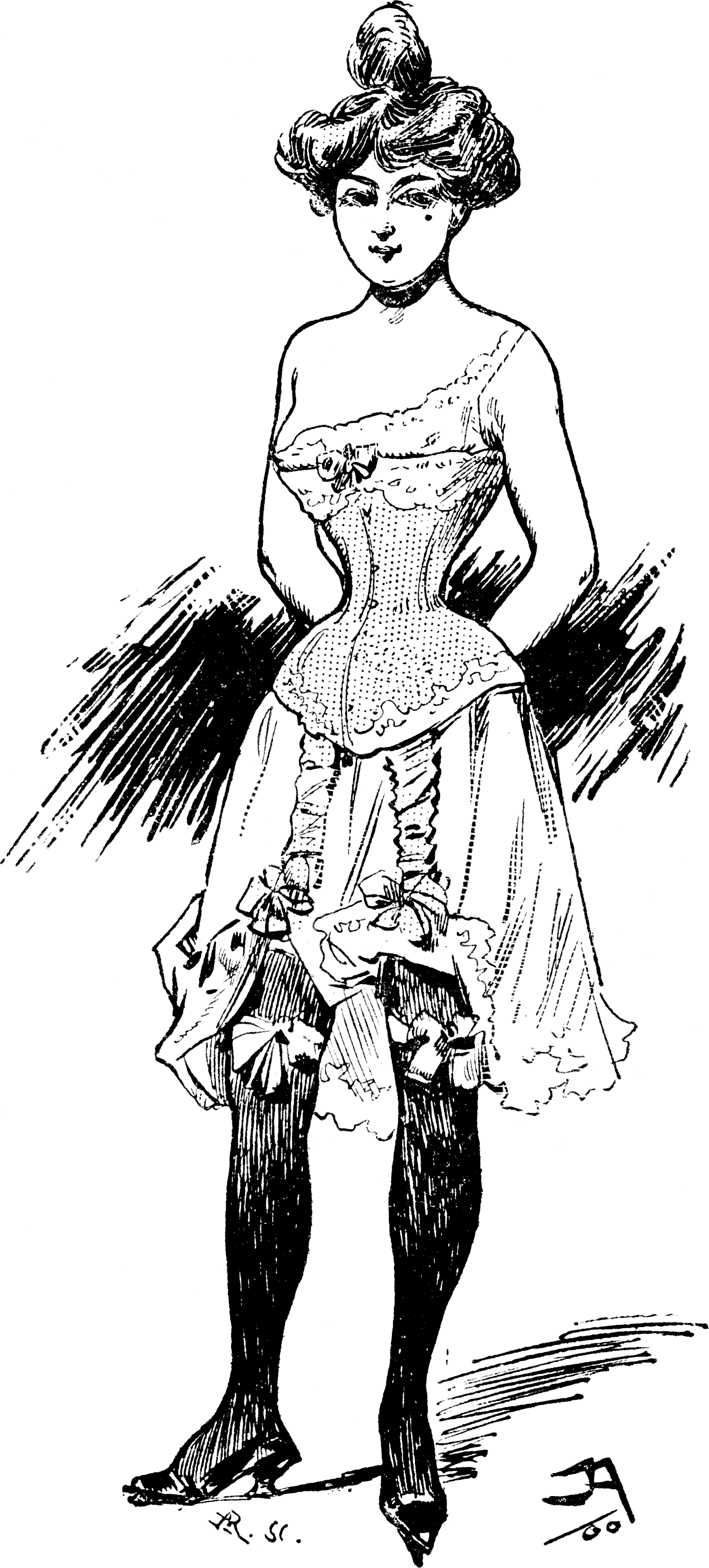 Vous en avez de idées de me faire promener comme cela en corset et en pantalon, et pour rien !